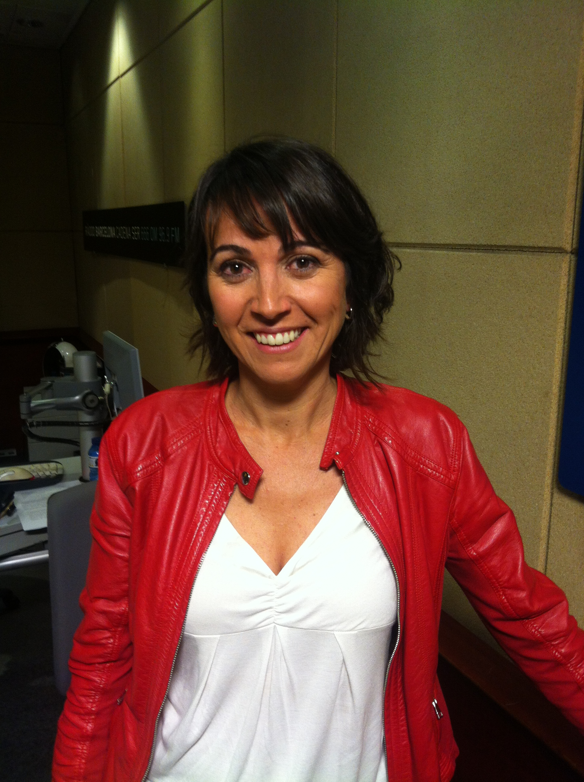 Lídia Heredia